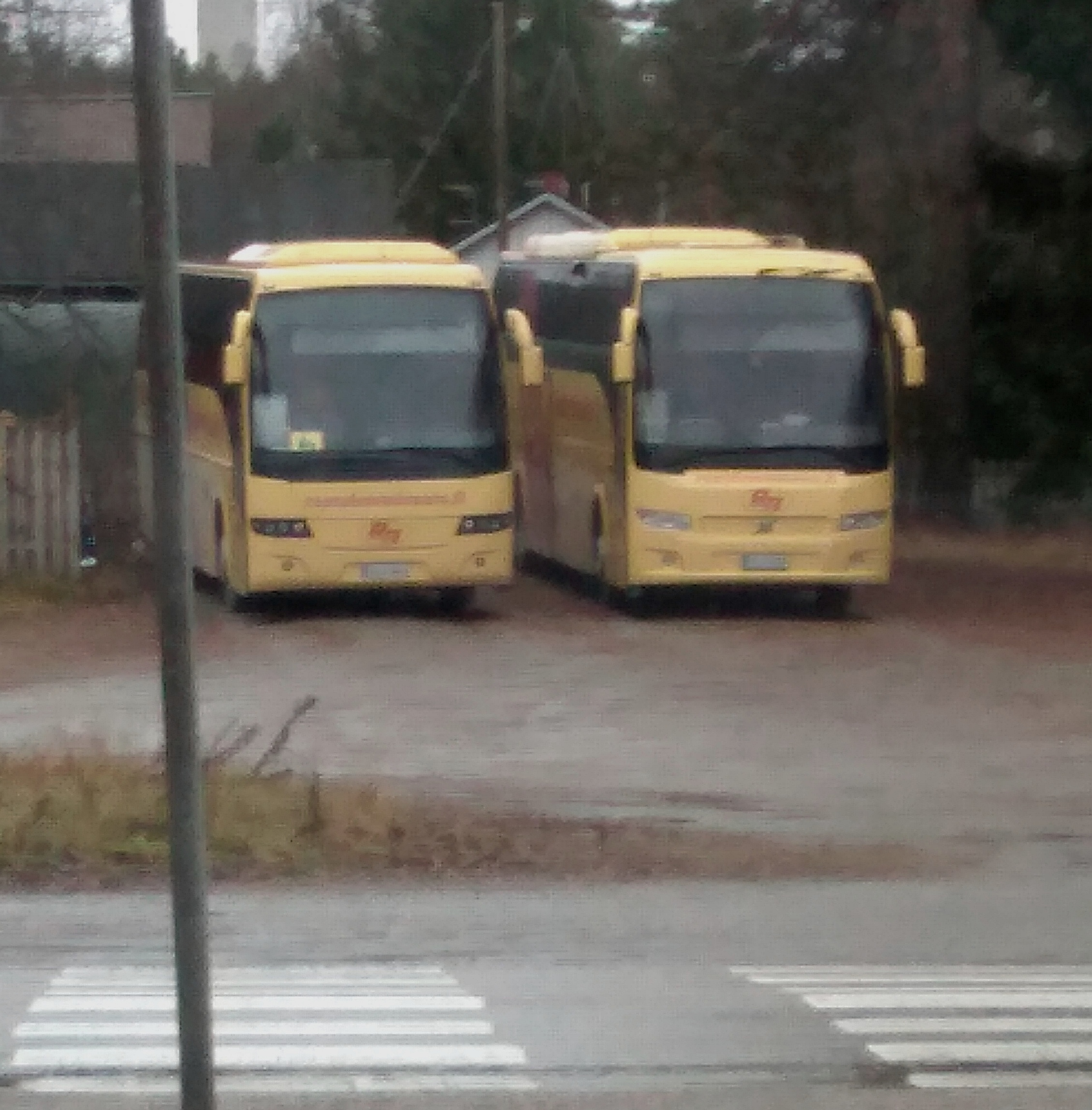 Rautalammin Auton Volvo 9700 linja-autot Rautalammin varikolla.